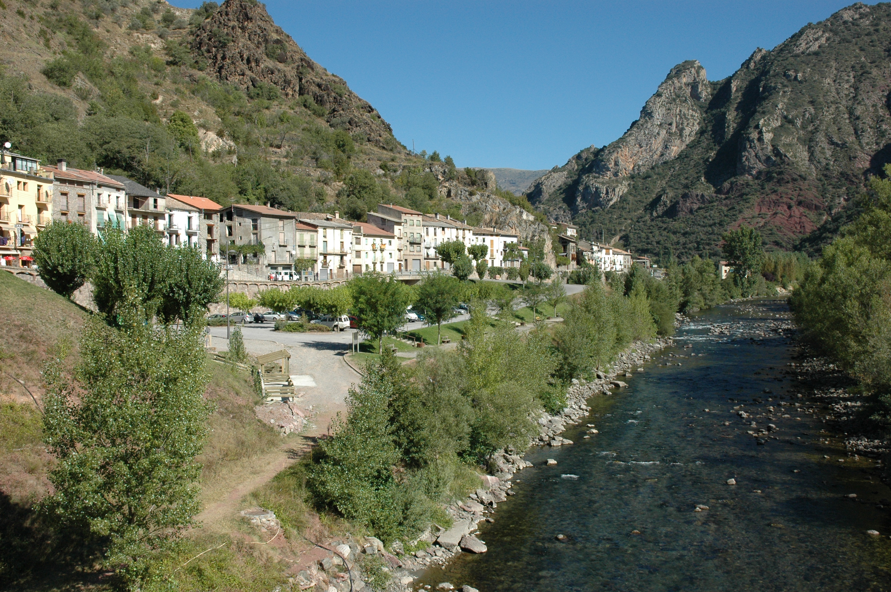 Gerri de la Sal